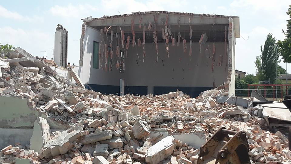 demolizione palestra